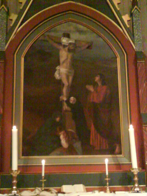 Altertavlen i Lundring kirke Jesus på korset, malt av Maren Reisner Falch Sverdrup i 1860. ** Denne dateringen må være feil fordi 1) kunstneren ble født i 1865, 2) bildet er malt i kopi etter Eilif Peterssens alterbilde i Johannes kirke i Oslo, innviet 1878.